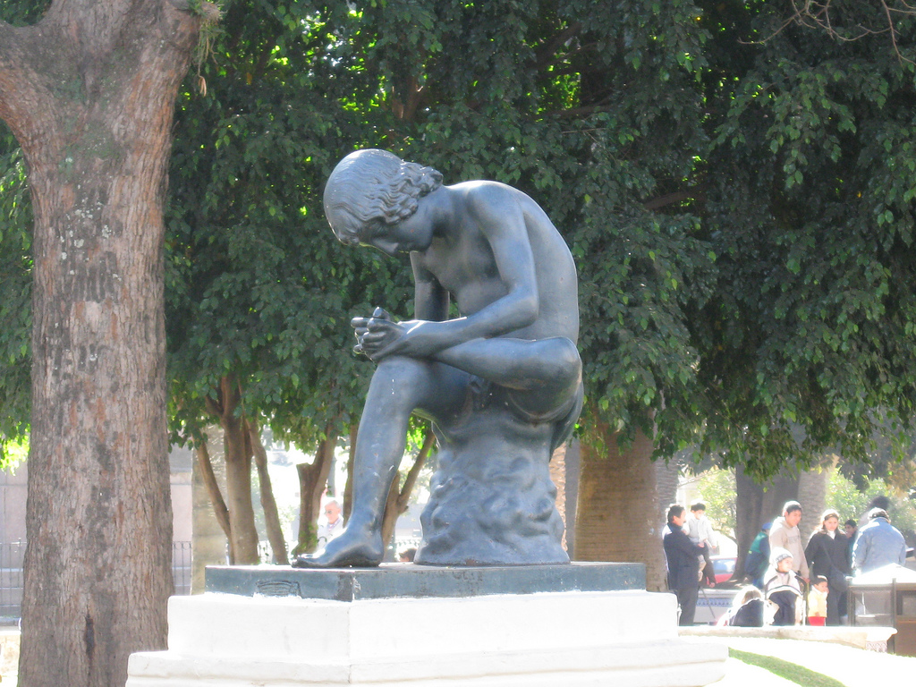 Niño peregrino